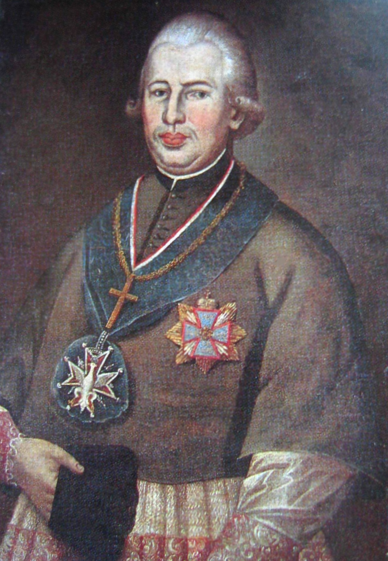 Kasper Cieciszowski anonymous portrait before 1831 author User:Mathiasrex Maciej Szczepańczyk